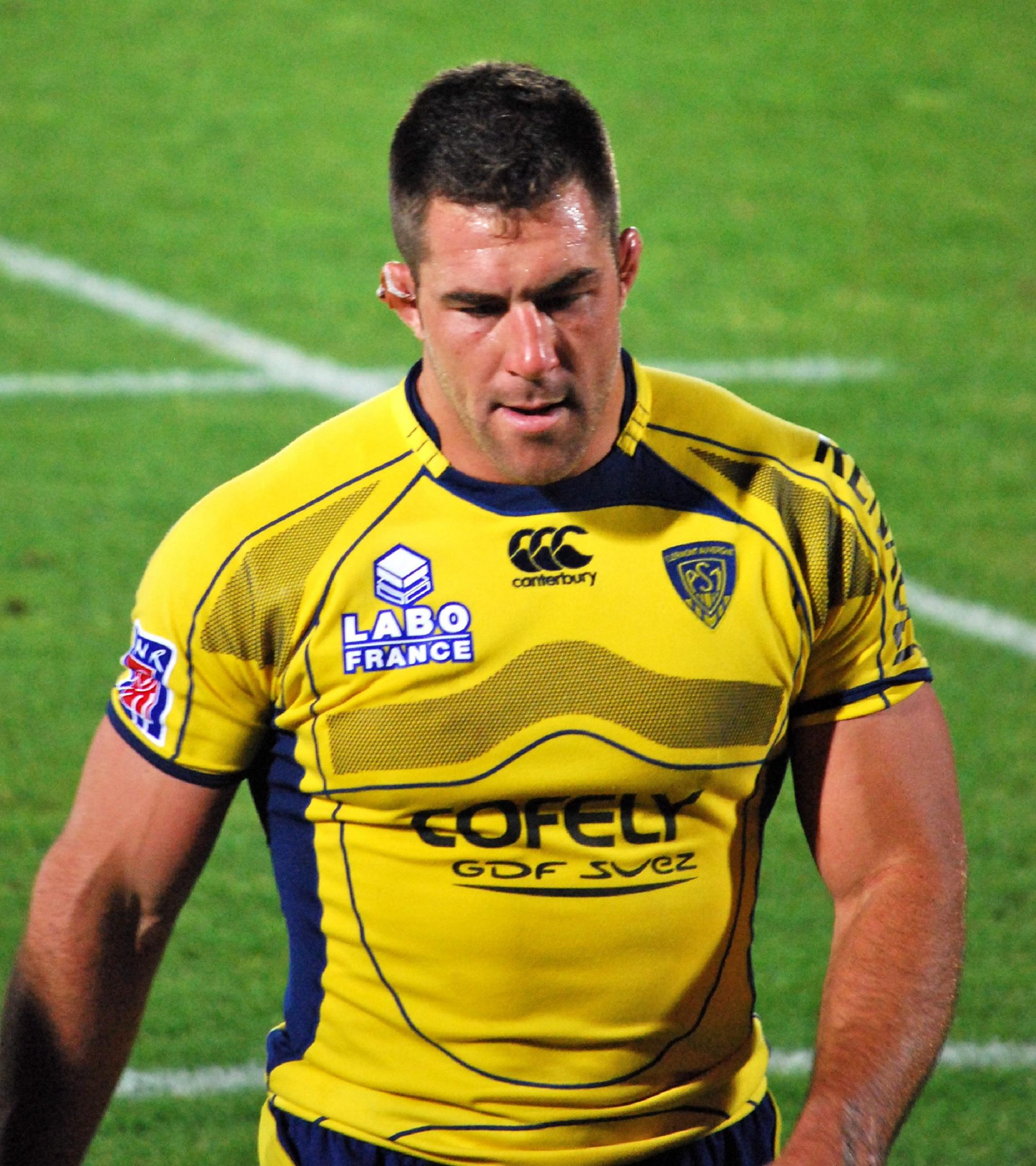 Jamie Cudmore sort pour 10 mn carton jaune pour un placage haut lors de la demi-finale de top 14 2008-2009 opposant Clermont à Toulouse